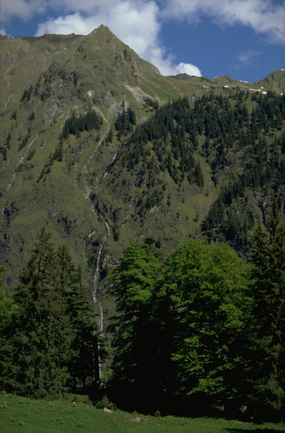 Seeköpfle (1920 m) von Lugenalpe mit dem Abfluss des Seealpsees, dem Seebach.